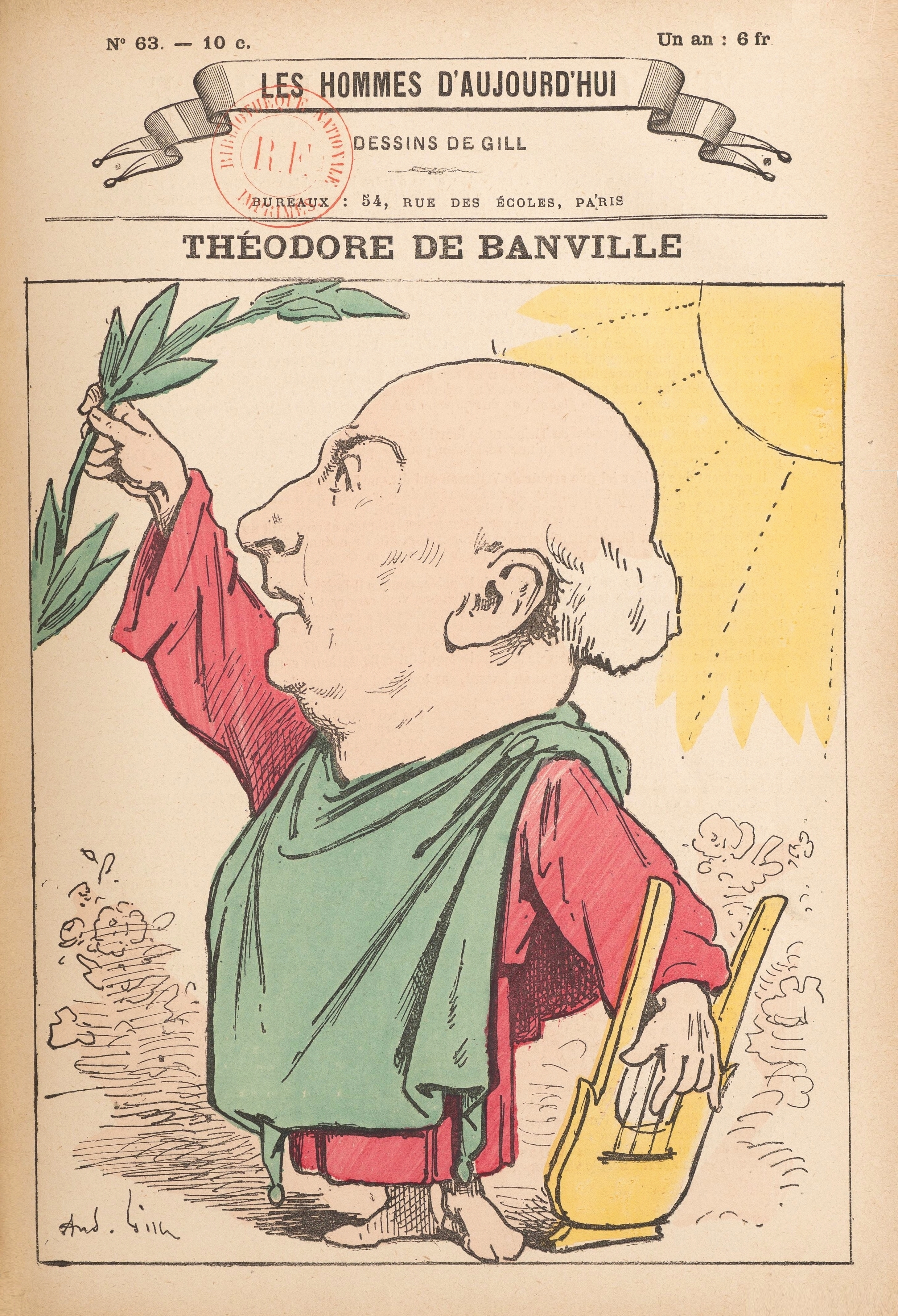 Théodore de Banville par André Gill, Les Hommes d'aujourd'hui n°63 (1879-1880)